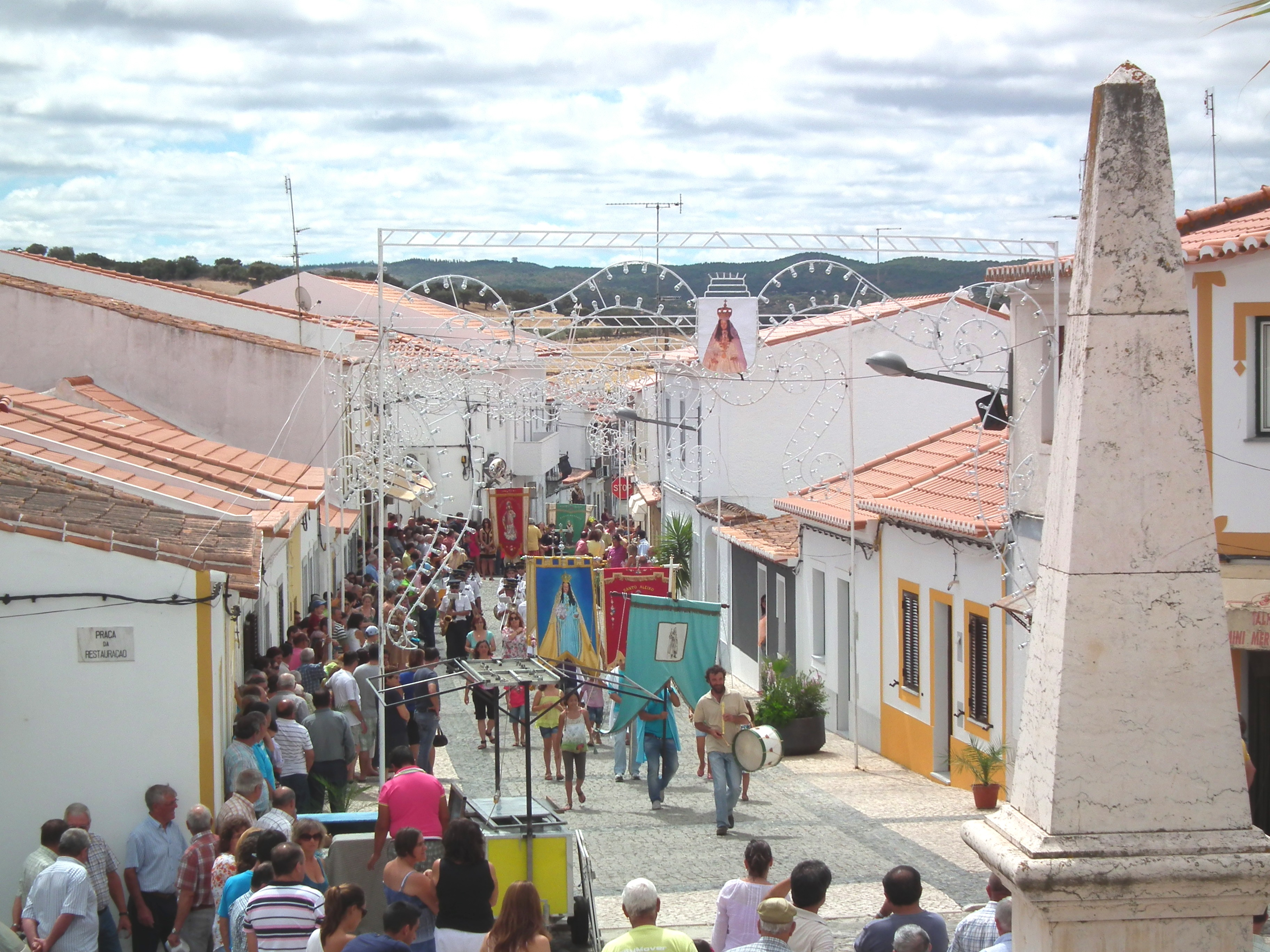 "Cumprimento" dos Santos a N. Sra. Das Necessidades